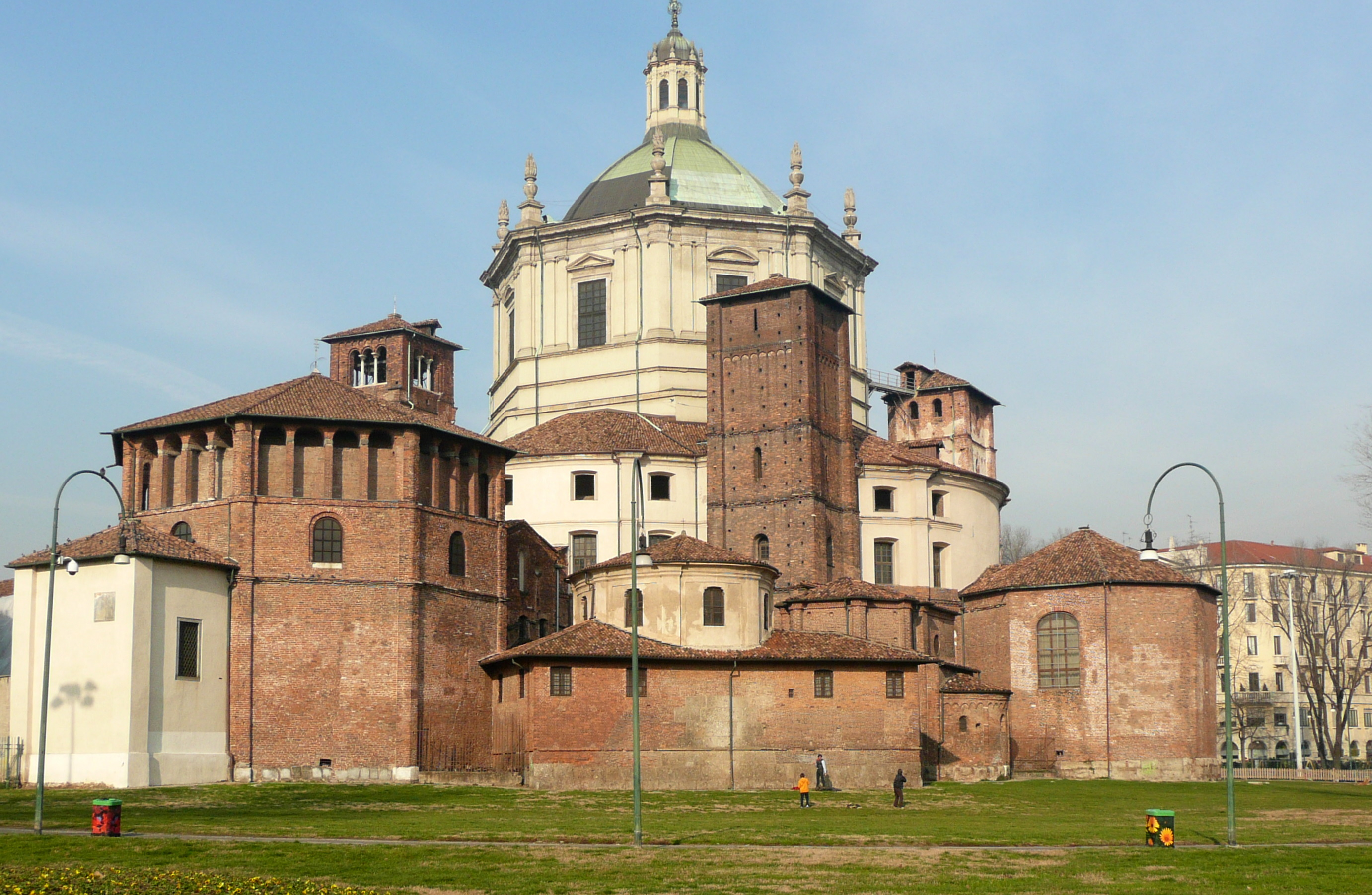 San Lorenzo Maggiore in Milan.